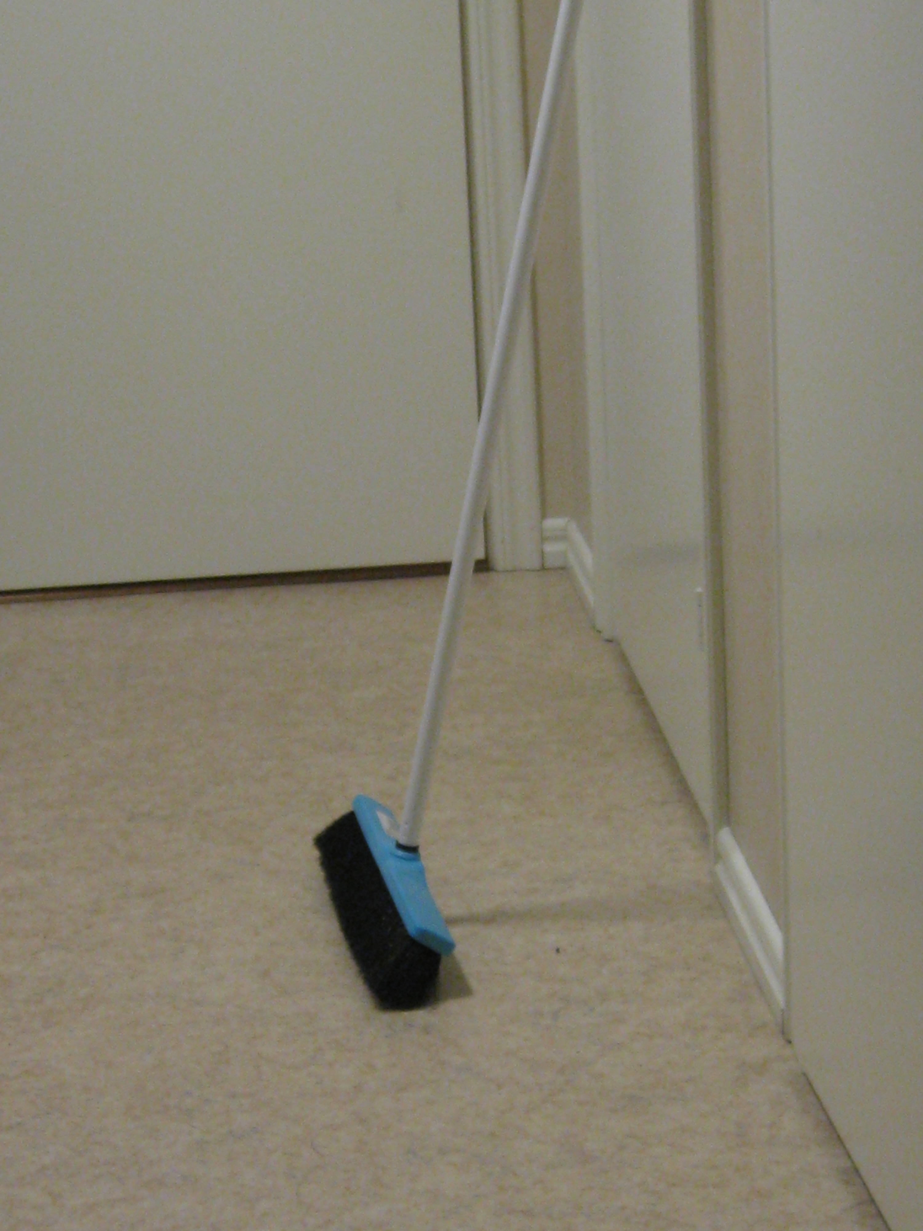 En sopborste ^^